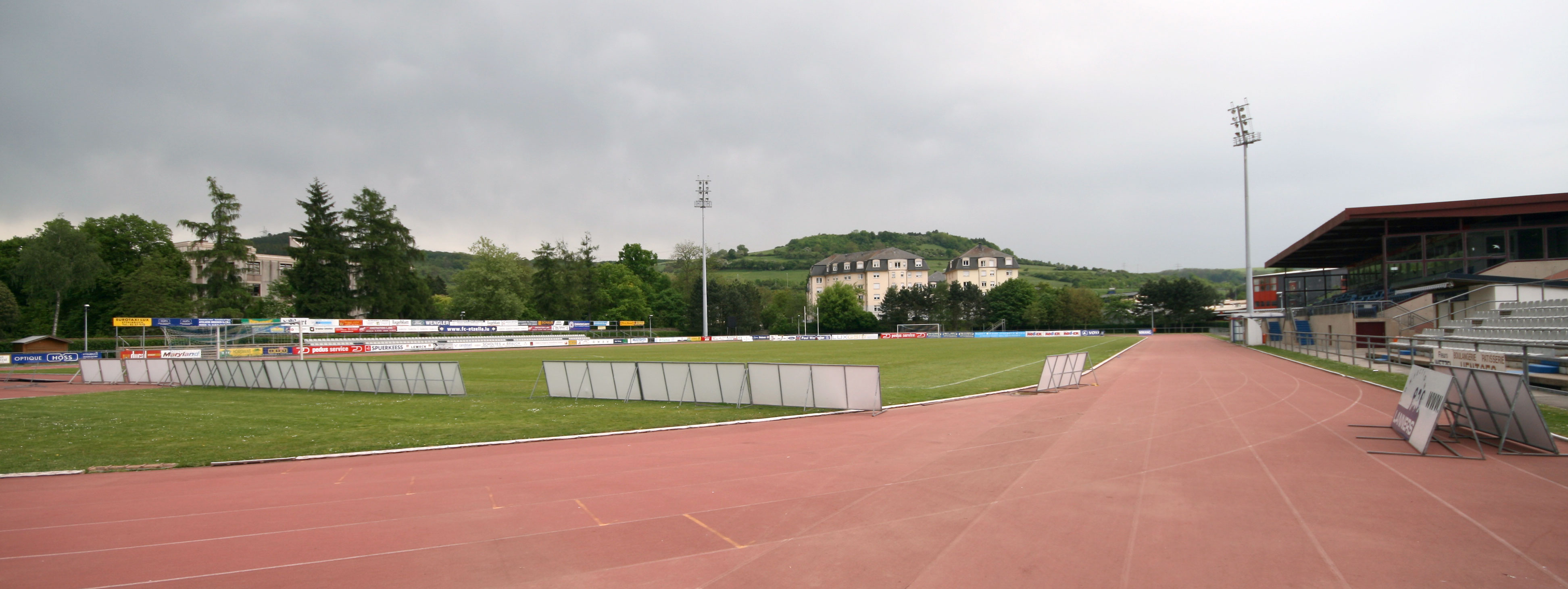 De Spillterrain vum Etzella Ettelbréck.